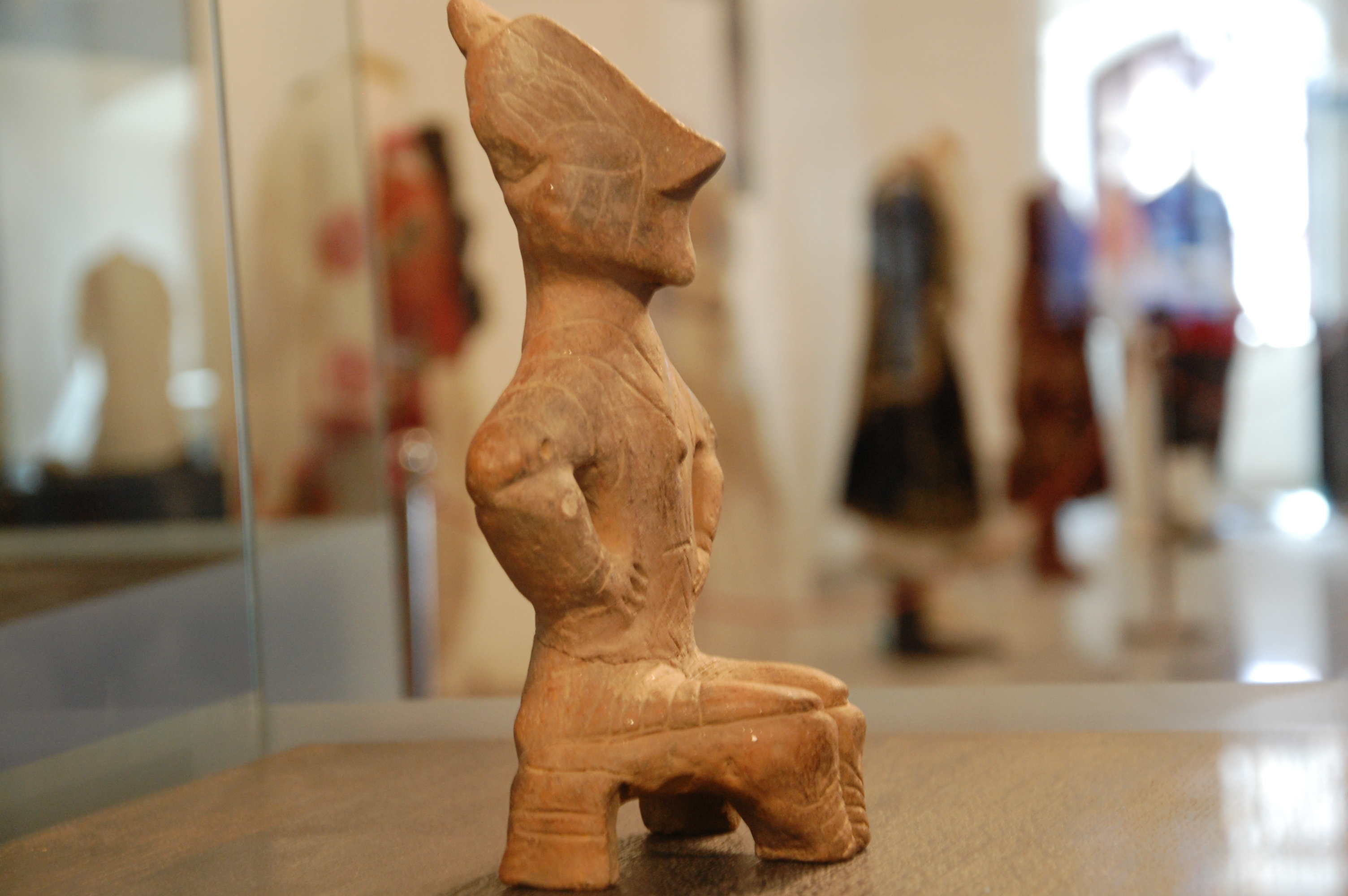 Muzeu I Kosovës